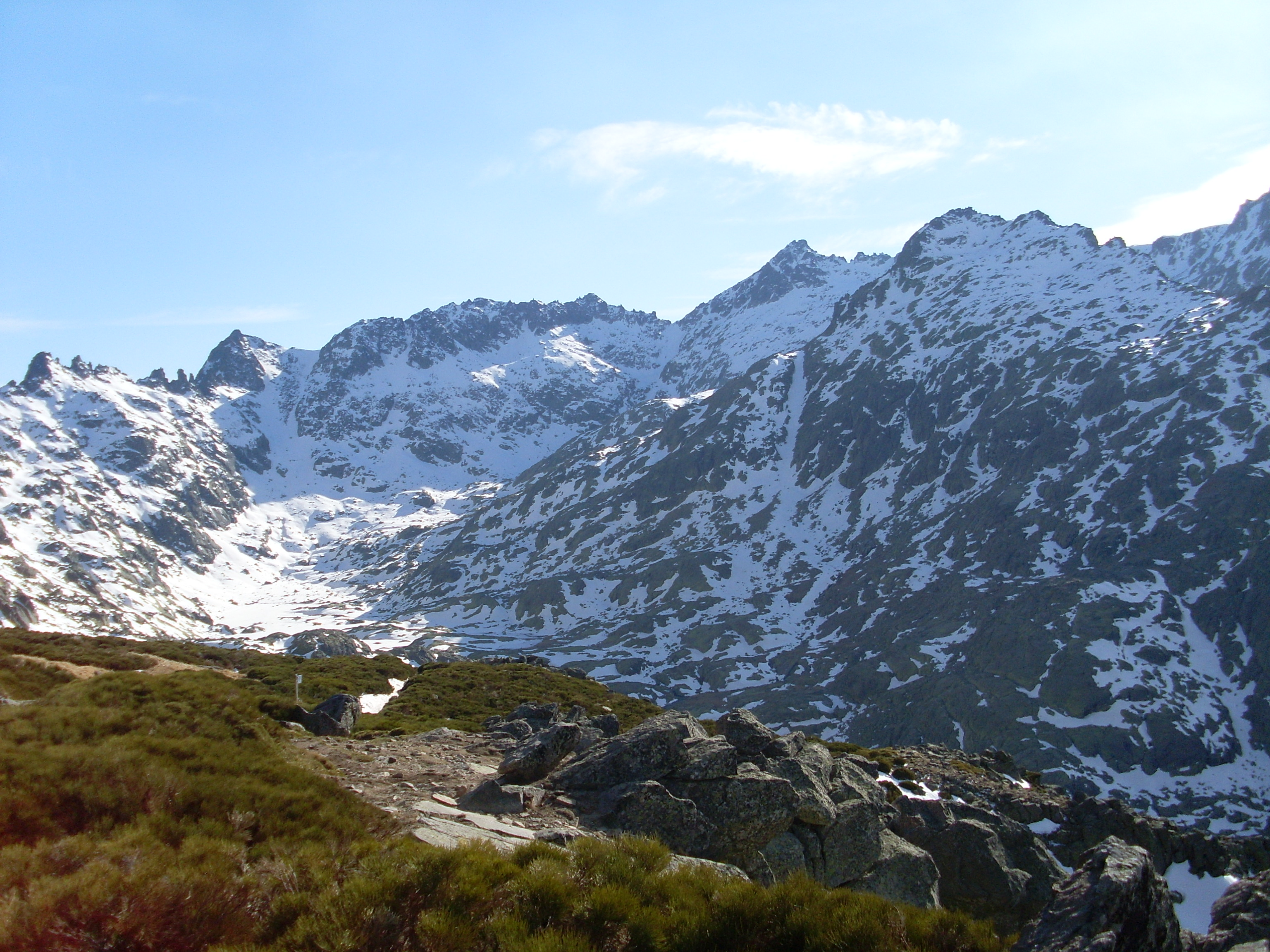 Circo de Gredos (provincia de Ávila, España).